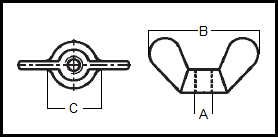 DIN 315